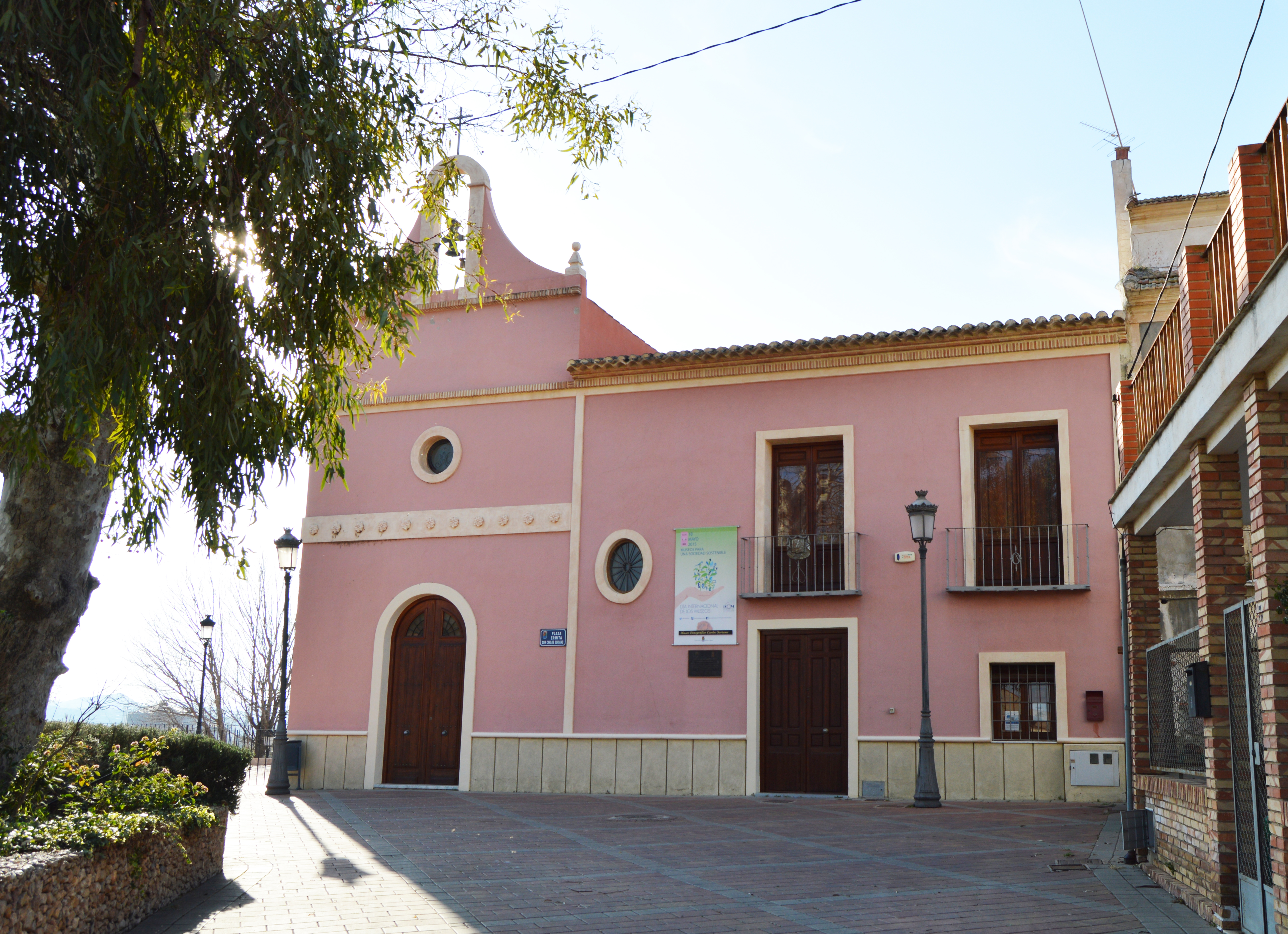 En esta imagen podemos ver la fachada de la casa ermita de Carlos Soriano